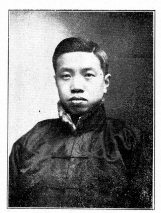 中文（台灣）: 國會議員肖像